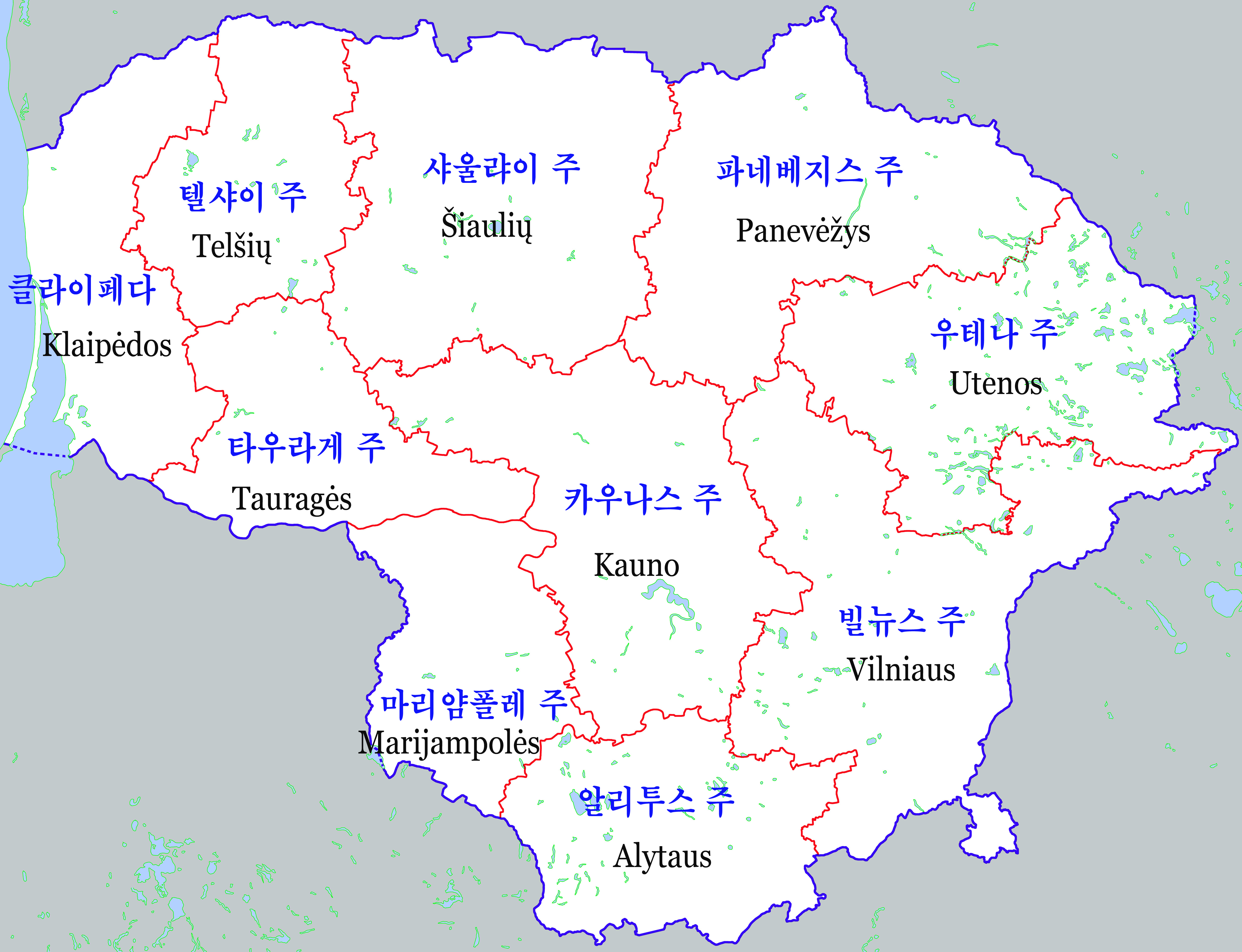 리투아니아 행정구역